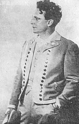 J.Berlík (1892-1972)v roli Jeníka ve smetanově Prodané nevěstě (1922)